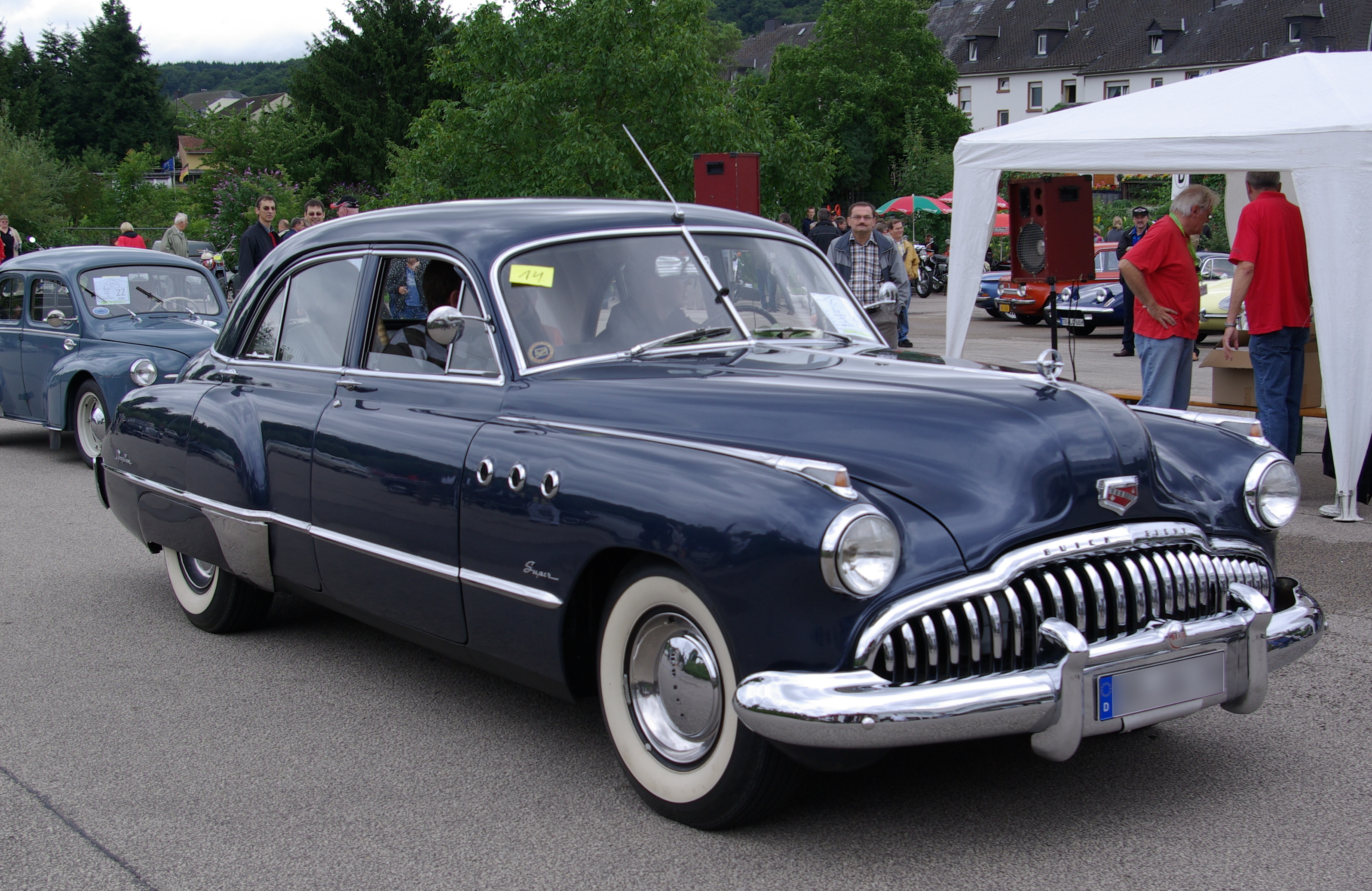 Buick Super Serie 50, Baujahr 1949, aufgenommen bei / photographed at "25. Internationales Konzer Oldtimer-Treffen", 19. Juli 2009